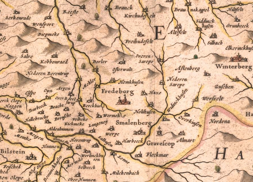 Karte Raum Schmallenberg, Auszug aus Blaeu 1645 - Westphalia Ducatus (Germany)